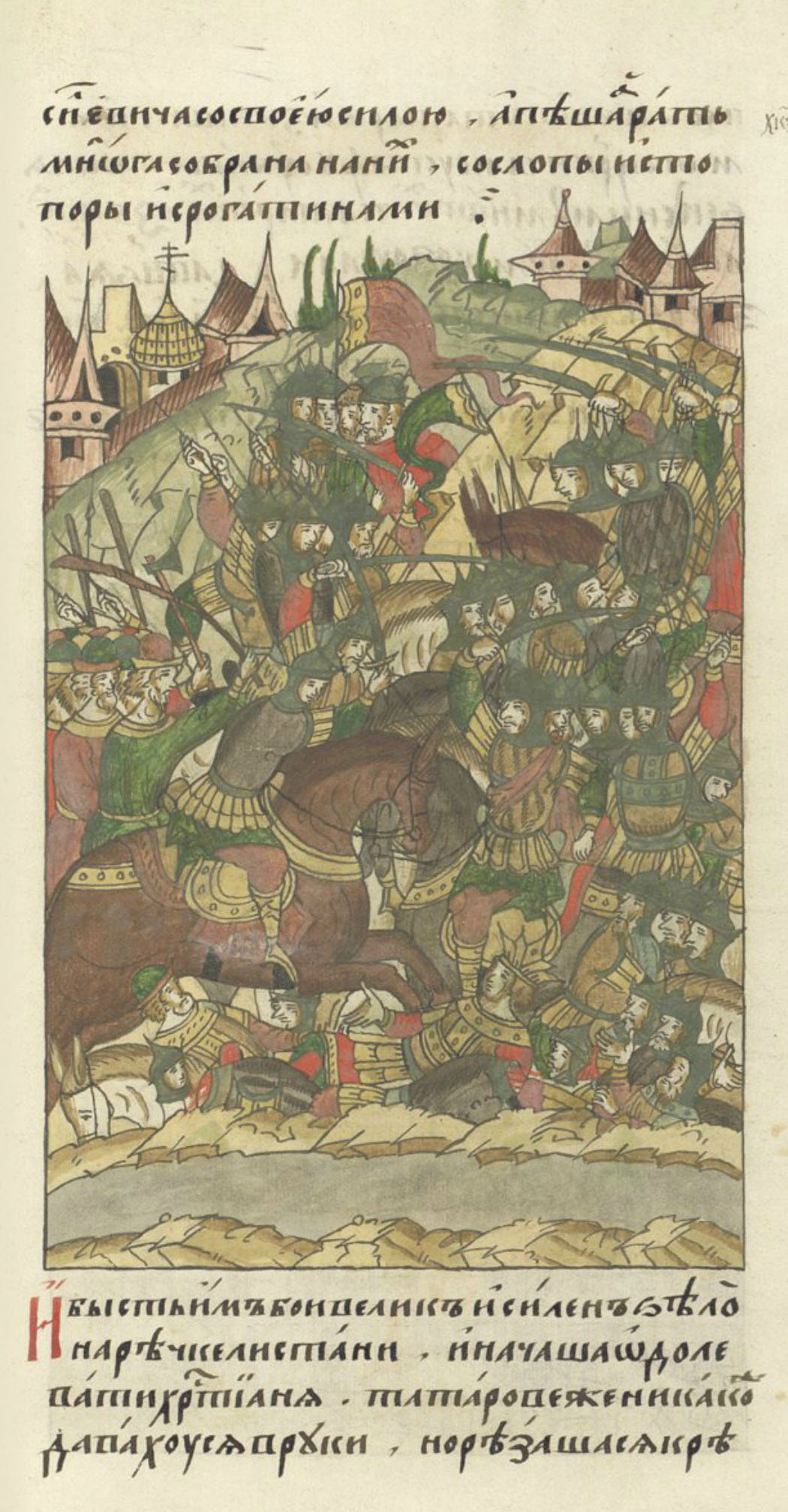 Лицевой летописный свод. Битва на реке Листани, 1444. "И приидоша на них мордва на ртах с сулицами и с рогатинами и с саблями, а казаки рязанскиа такоже на ртах с сулицами и с рогатинами и с саблями з другиа стороны; а воеводы великого князя Василья Васильевича со своею силою; и пешаа рать многа собрана на них с ослопы и с топоры и с рогатинами. И бысть бой велик и силен зело на речке Листани, и начаша одолевати христианя."